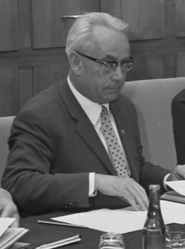 German Federal Minister Bruno Heck on May 9, 1968